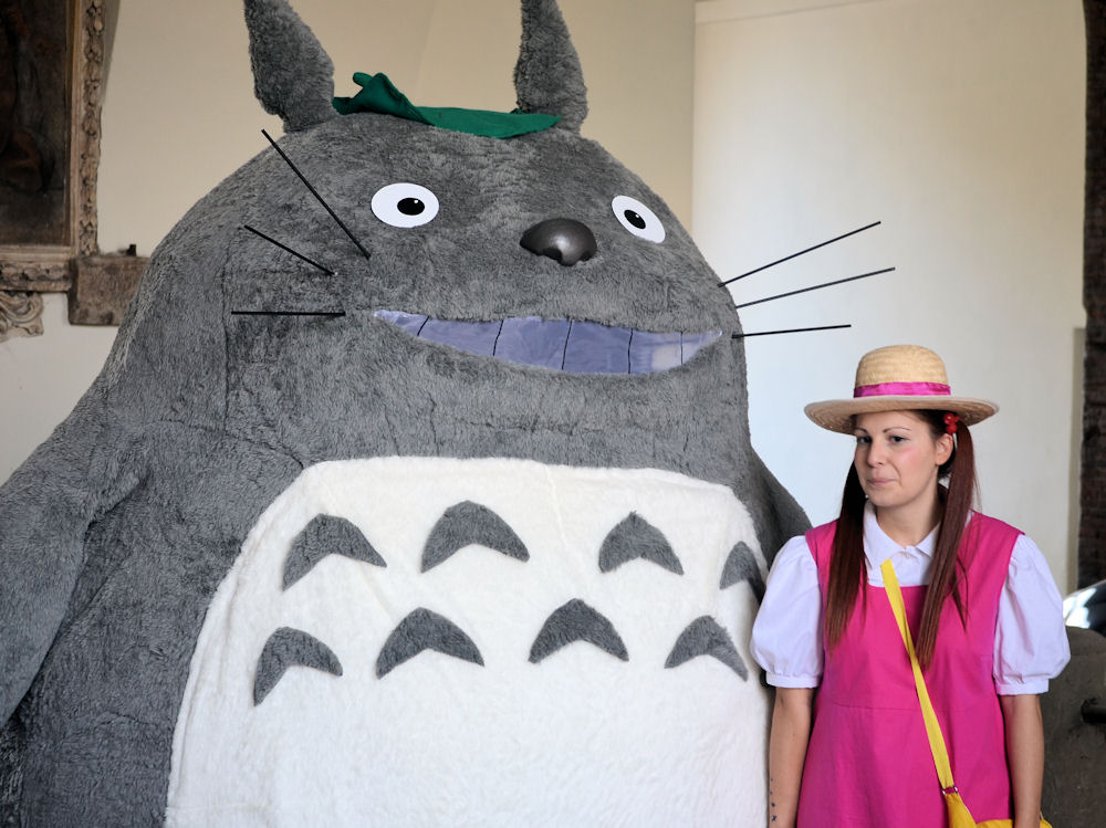 Lucca comics & games 2013